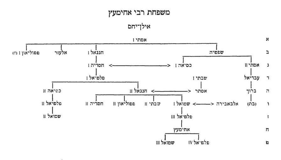 גנאולוגיה